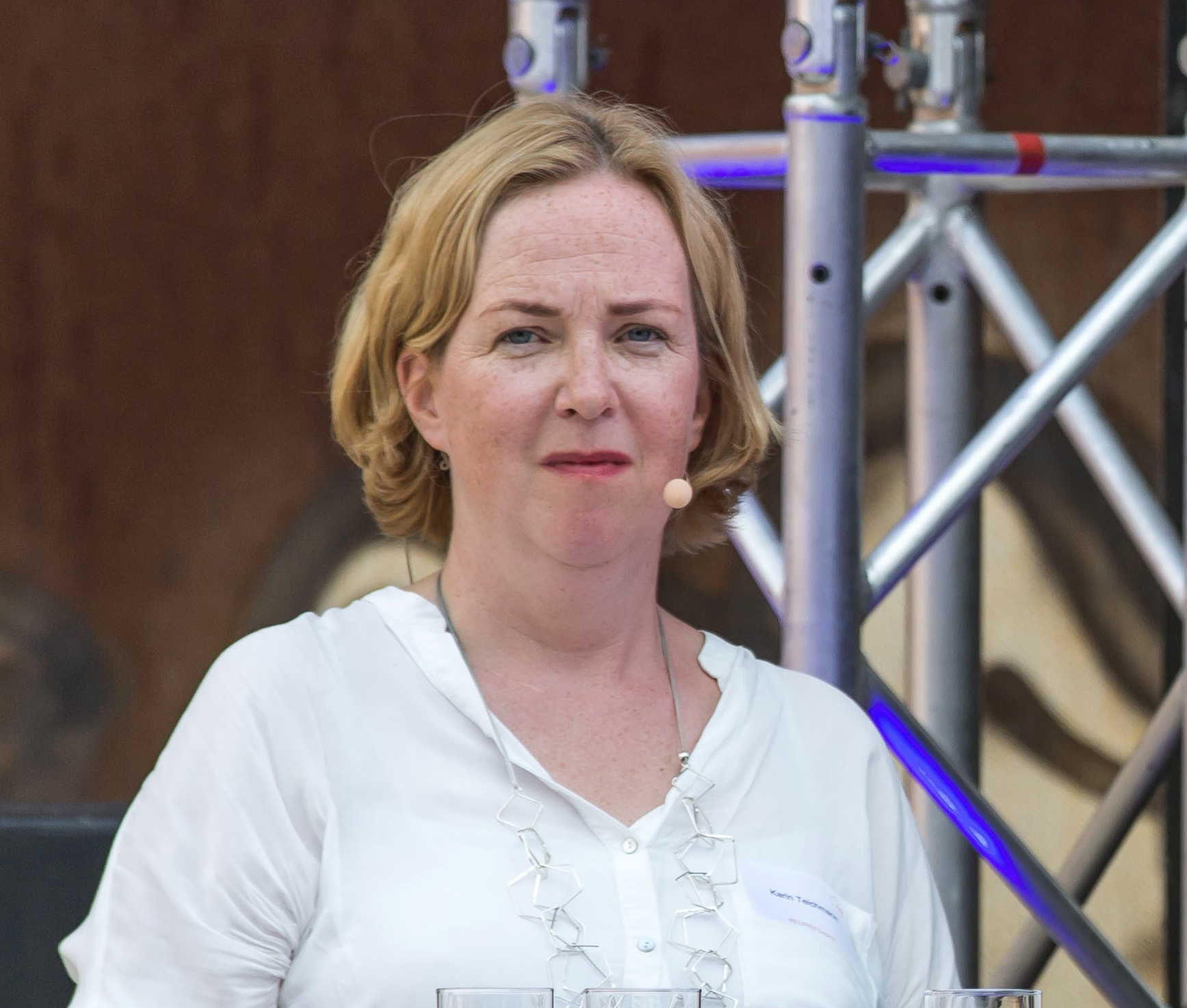 Karin Teichmann, Vorstand EUREF AG